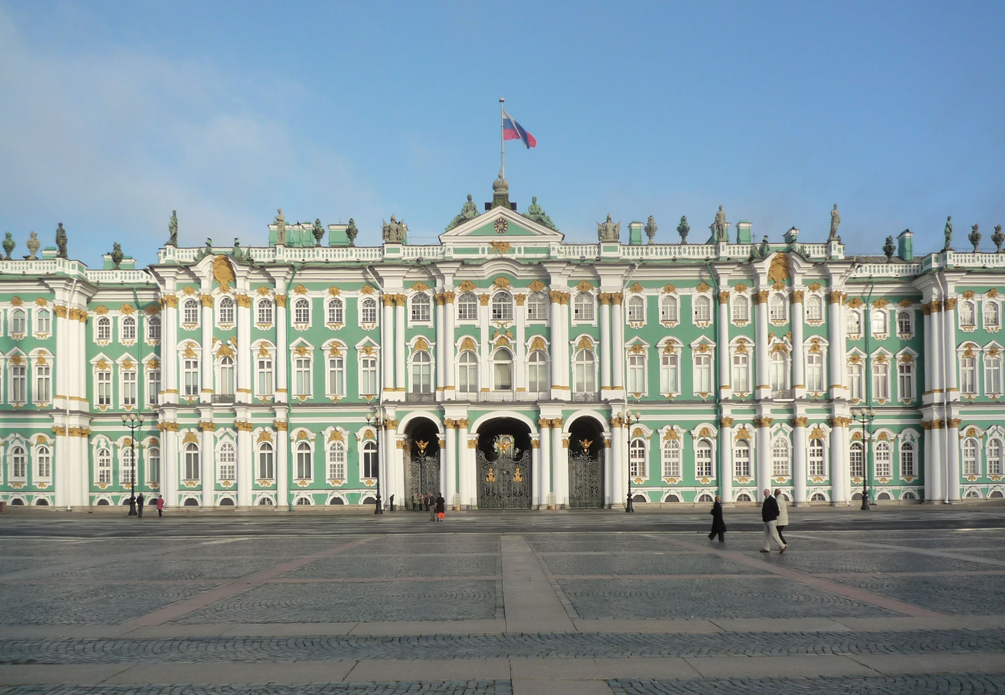 Hermitage 07